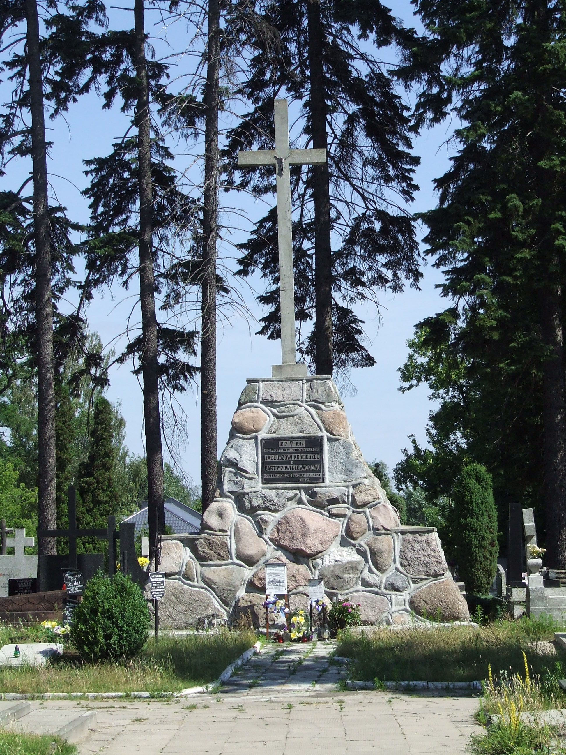 Krzyż na Cmentarzu w Łodzi-Rudzie Pab. Autor: Walther, 2006